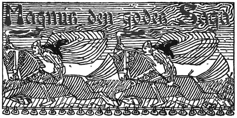 Tittelfrise Magnus den godes saga